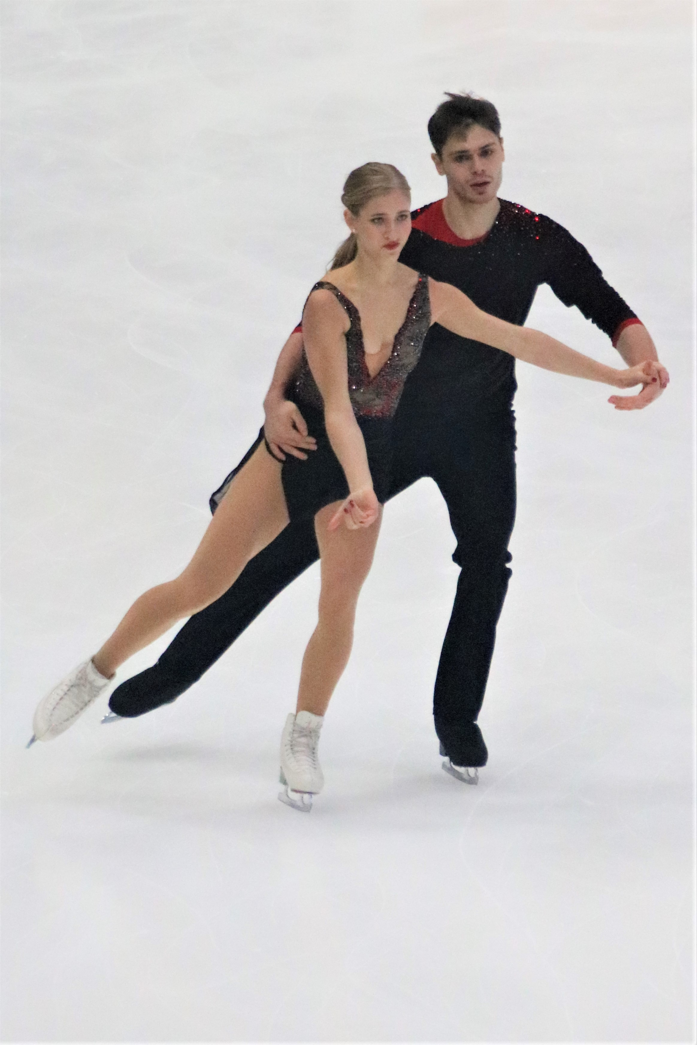 Минерва Фабьенн Хазе / Нолан Зегерт (Германия) на Rostelecom Cup 2019